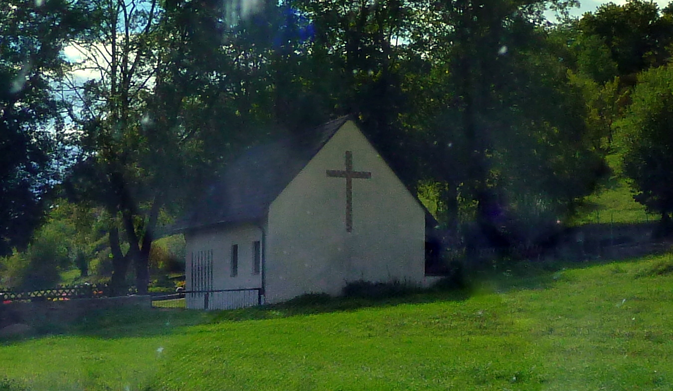 Kleine Kapelle vor Oberhausen an der Appel